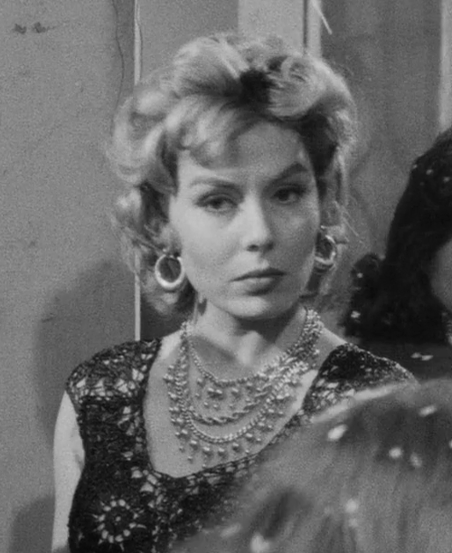 scena dal film I soliti ignoti